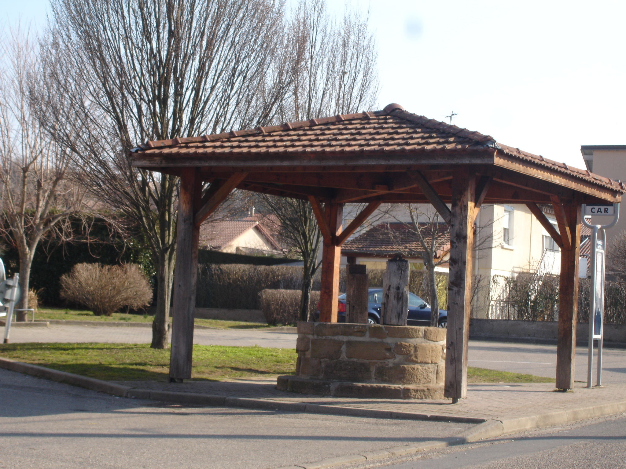 Toussieu (69) : Le puits